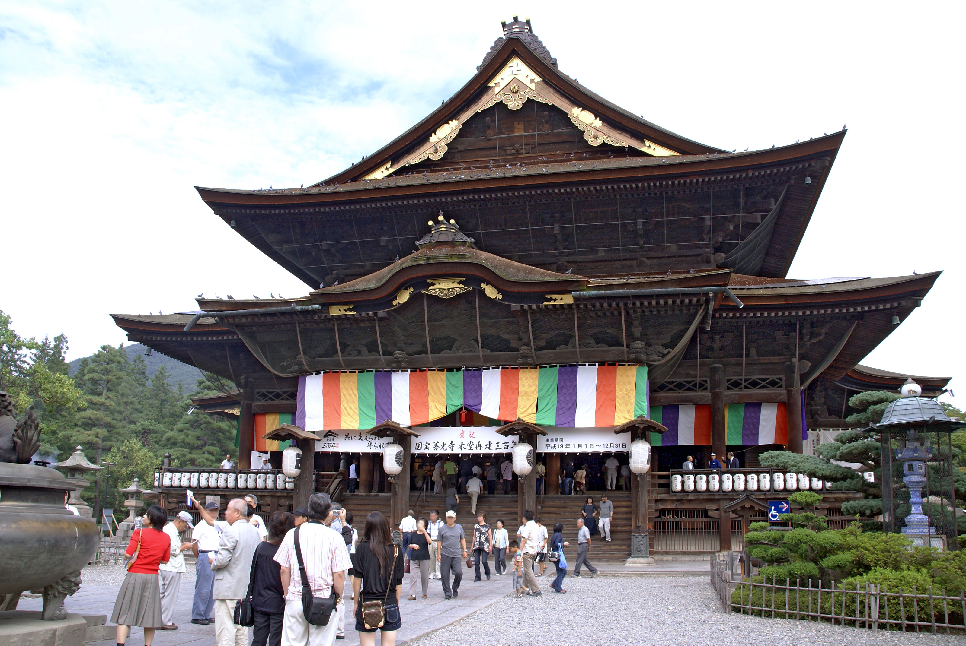 Zenkoji in Nagano, Nagano prefecture, Japan